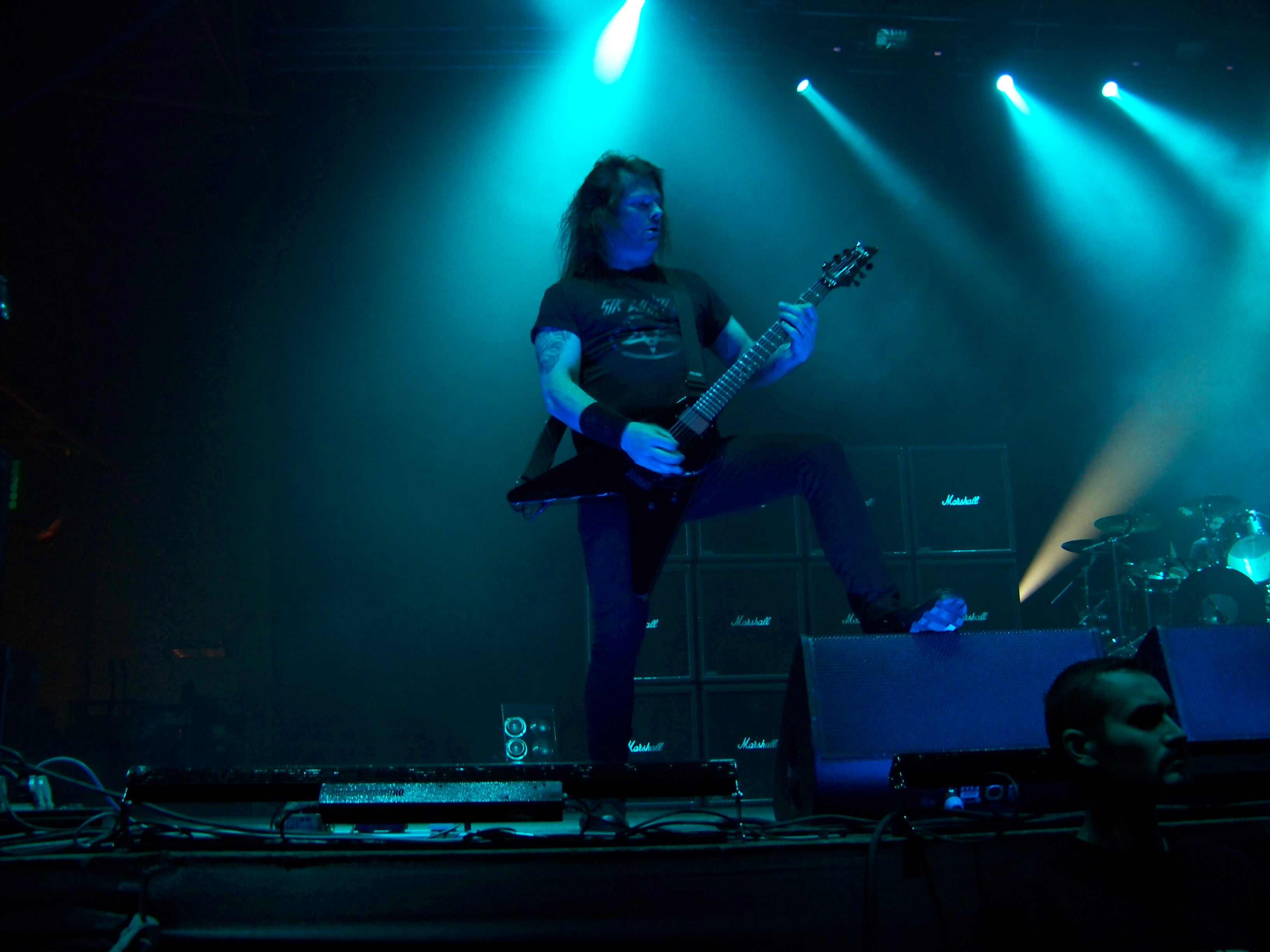 Фото Гери Холта из Exodus. Slayer. Март 2011, Киев, концерт Slayer и Megadeth. Europian Carnage Tour 2011.